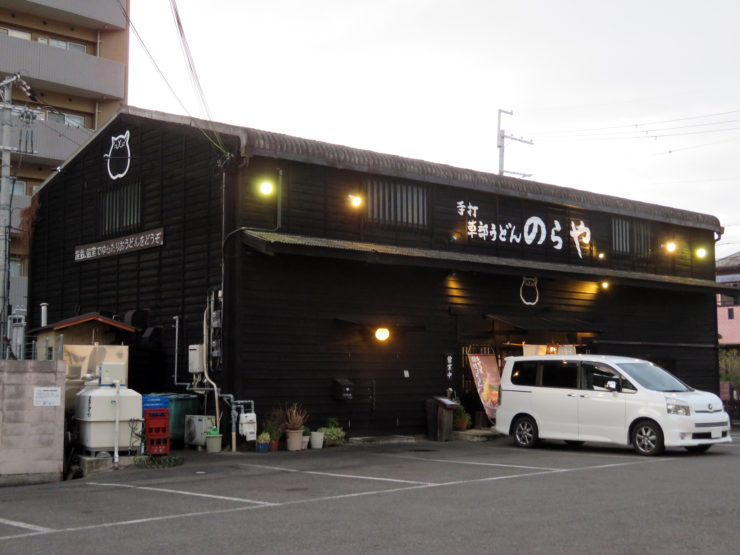 のらや石切店を撮影。